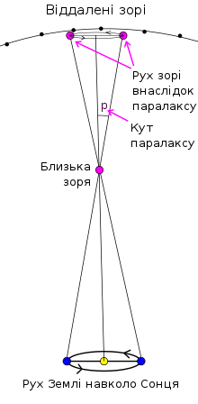 Діаграма зоряного паралаксу, українська версія файла